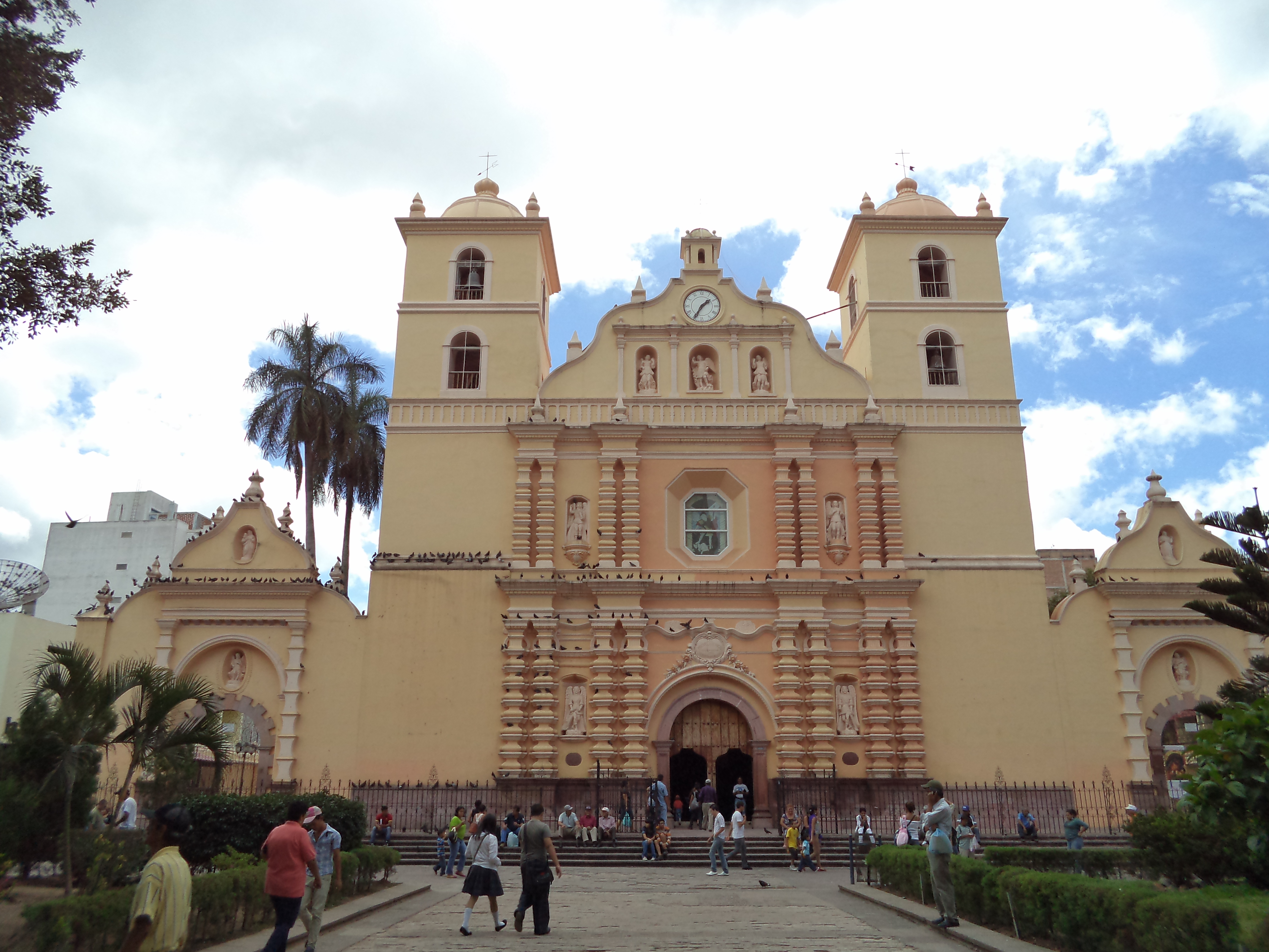 Barrio La Hoya, Tegucigalpa, Honduras